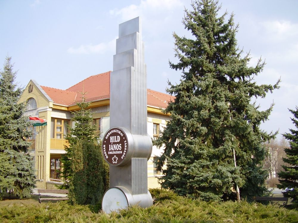 Hild-emlékoszlop (Kazincbarcika, 1984). Kazincbarcika, Fő tér. Alkotó: Mezey István.